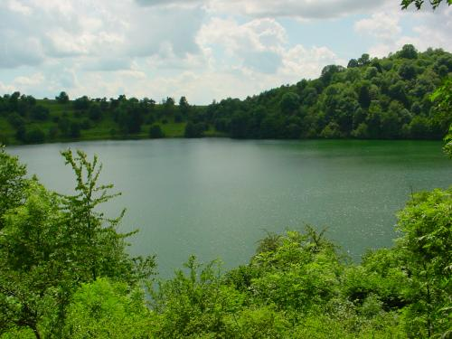 Weinfelder Maar bei Daun